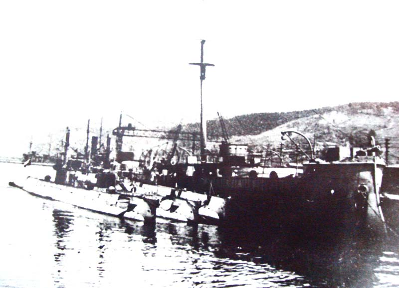 El monitor Huáscar como buque madre de las tripulaciones de la flotilla de submarinos de la clase H de la armada de chile